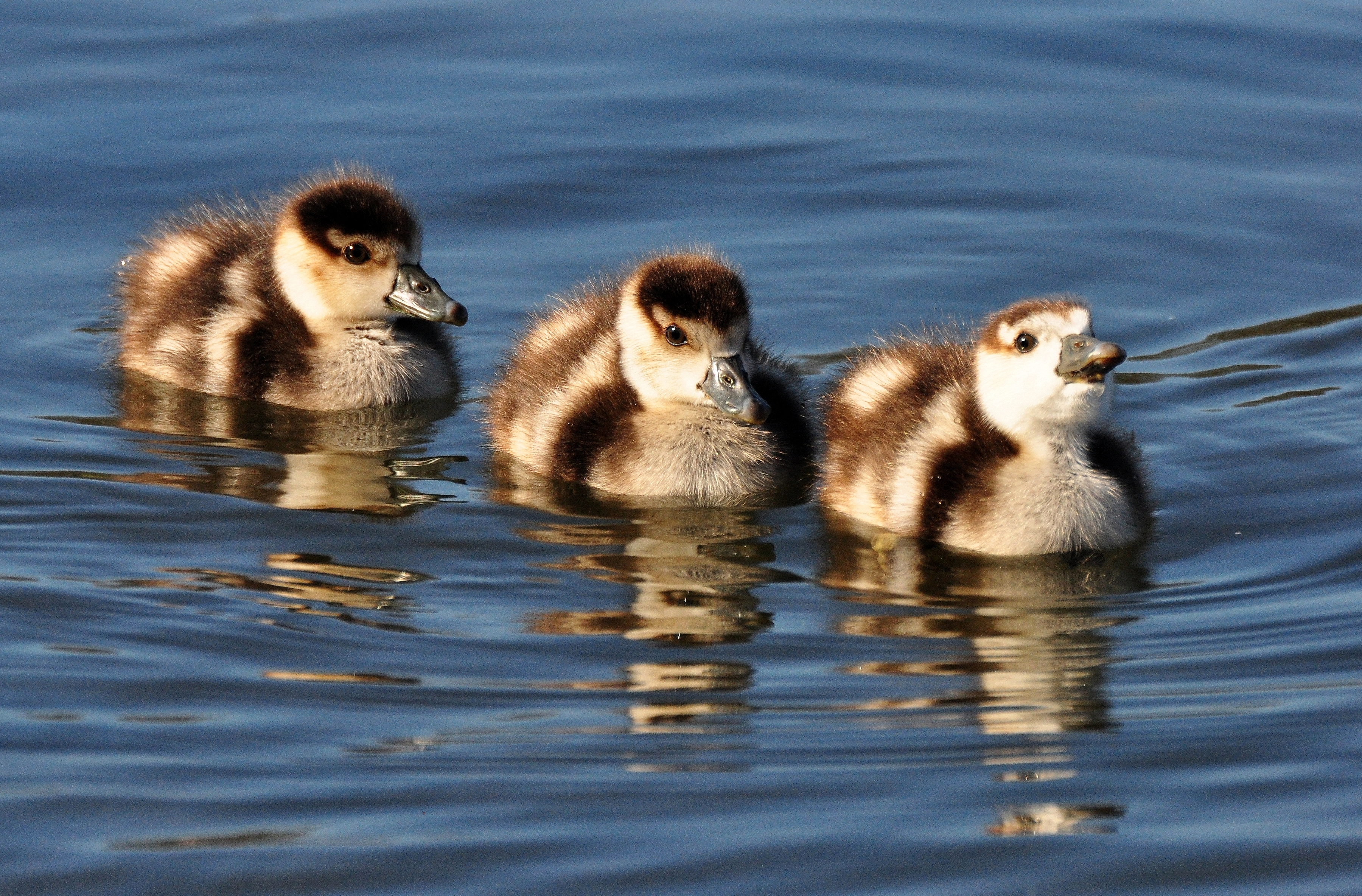 Nilgans-Familie 3 – Rheinauensee Bonn (Küken)